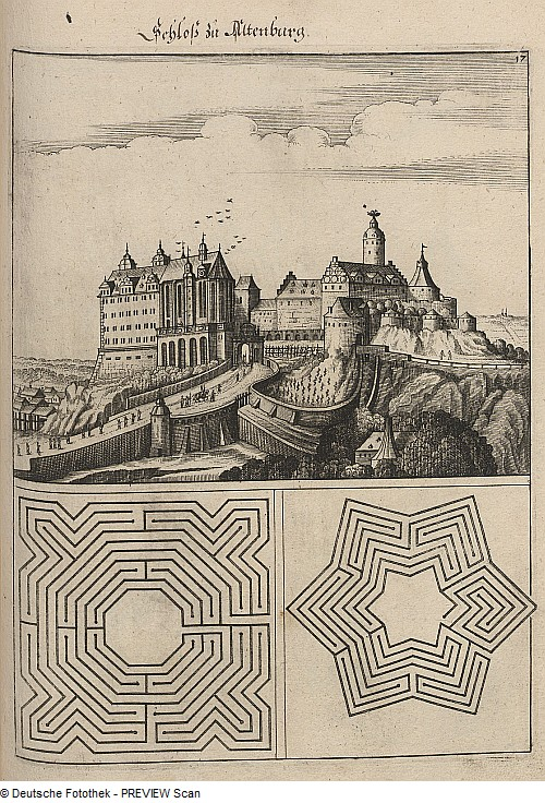 Original image description from the Deutsche Fotothek Architektur & Wasserförderung & Wasserkunst & Park